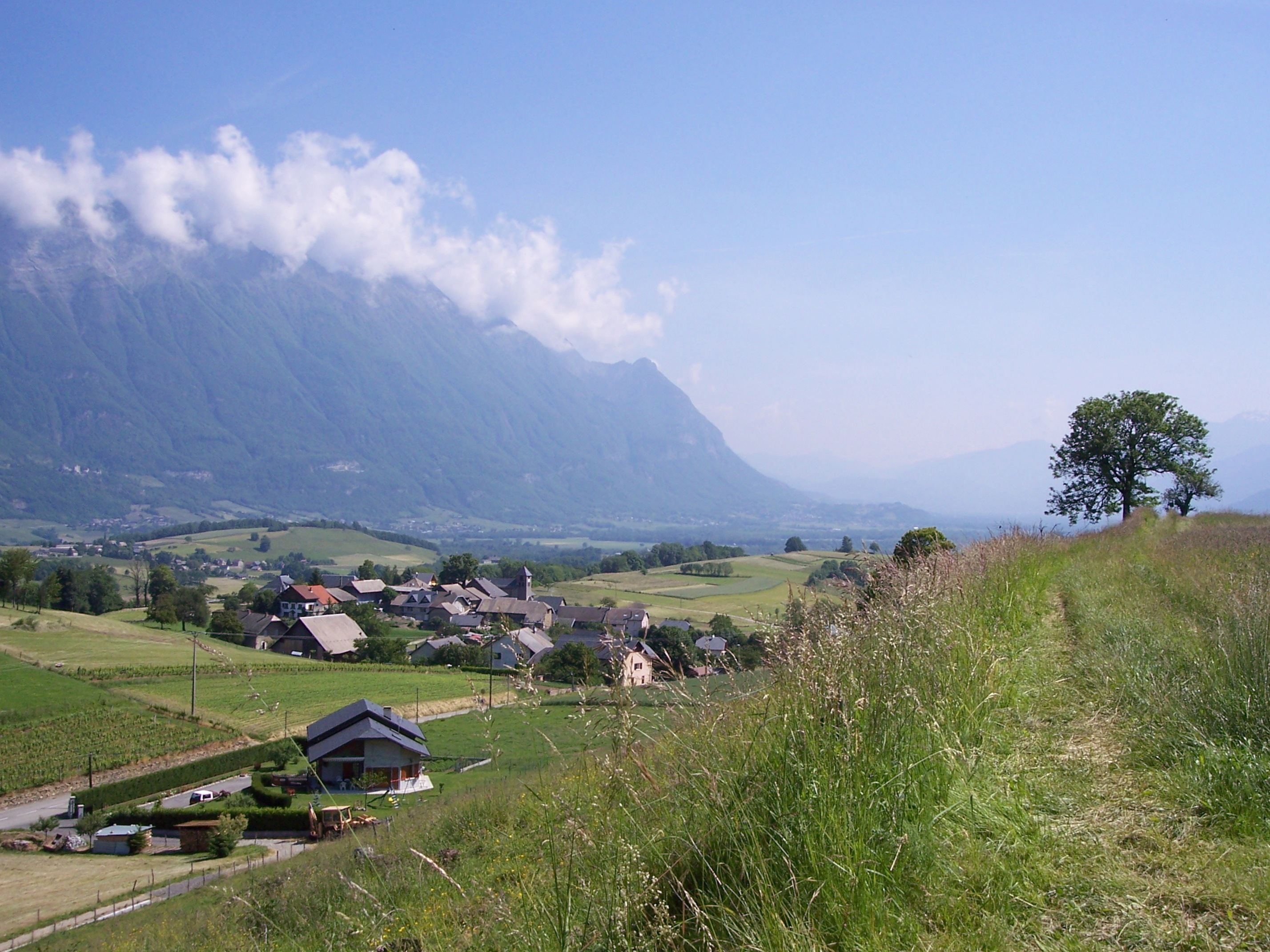 Vue de hauteville (73)